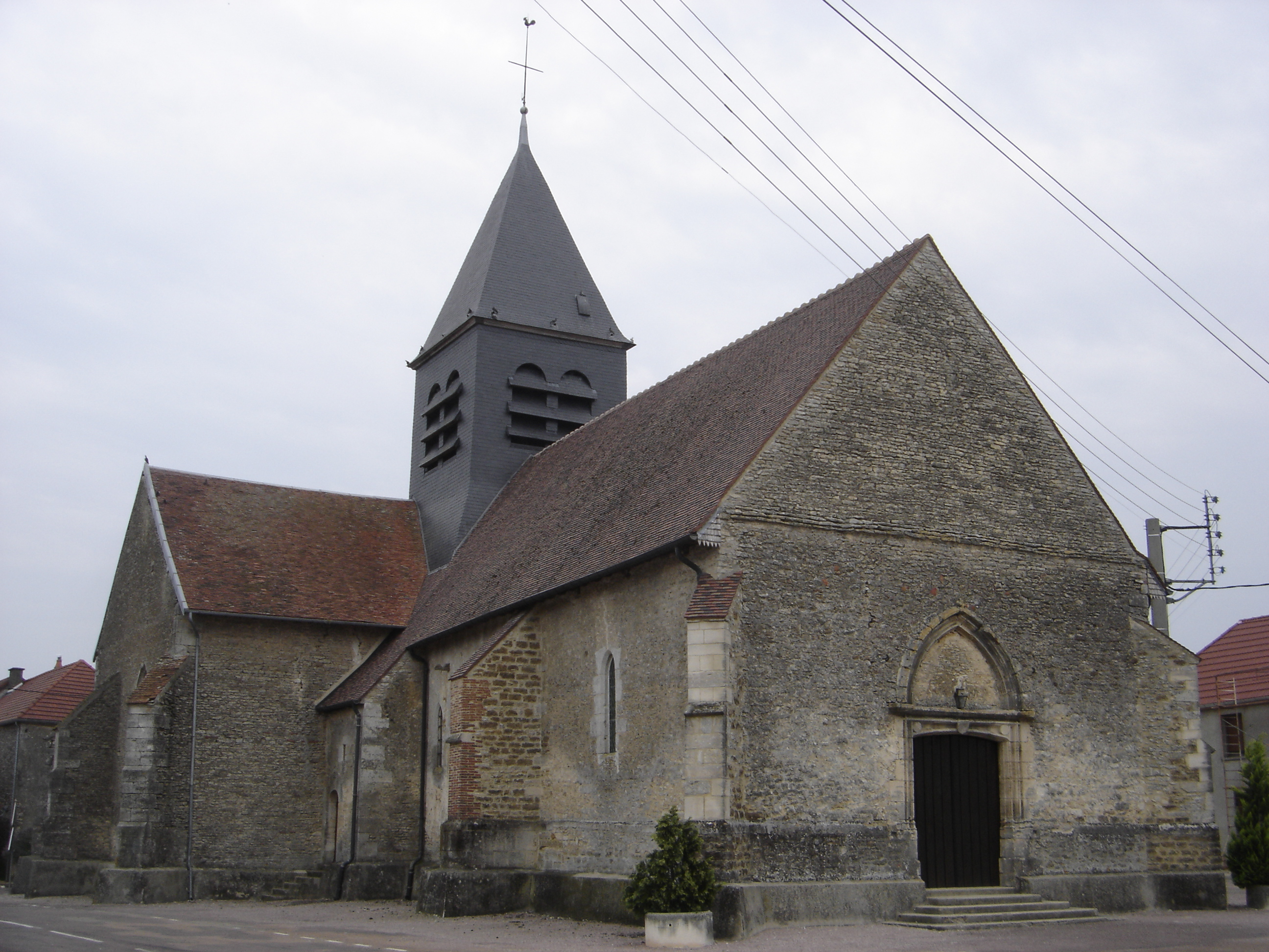 église Saint Andoche - Beurey - Aube - France